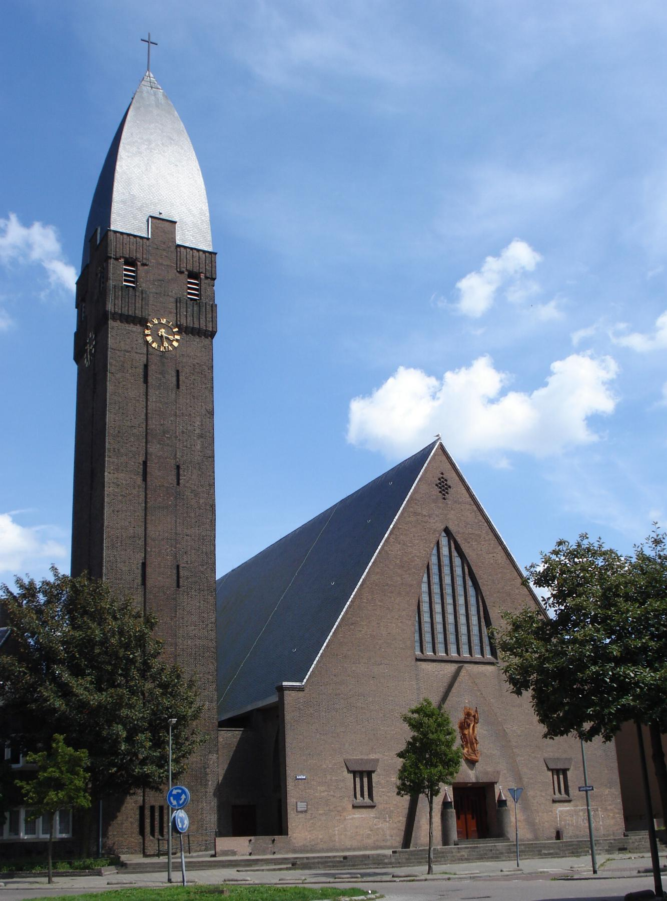 Schiedam, Rijnstraat. Kerk.